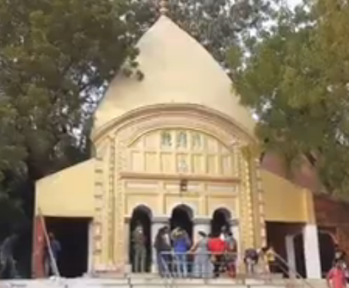 নলহাটেশ্বরী মন্দির